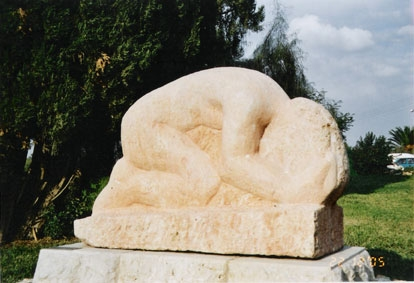 שכול, אבן אדומה, קיבוץ רבדים.